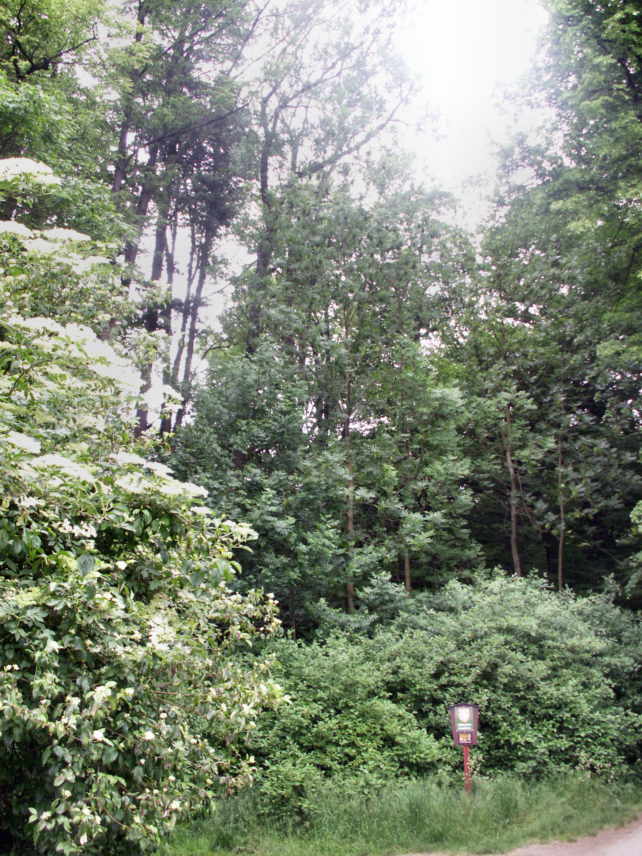 Letohrad, okres Ústí nad Orlicí, přírodní památka Letohradská bažantnice